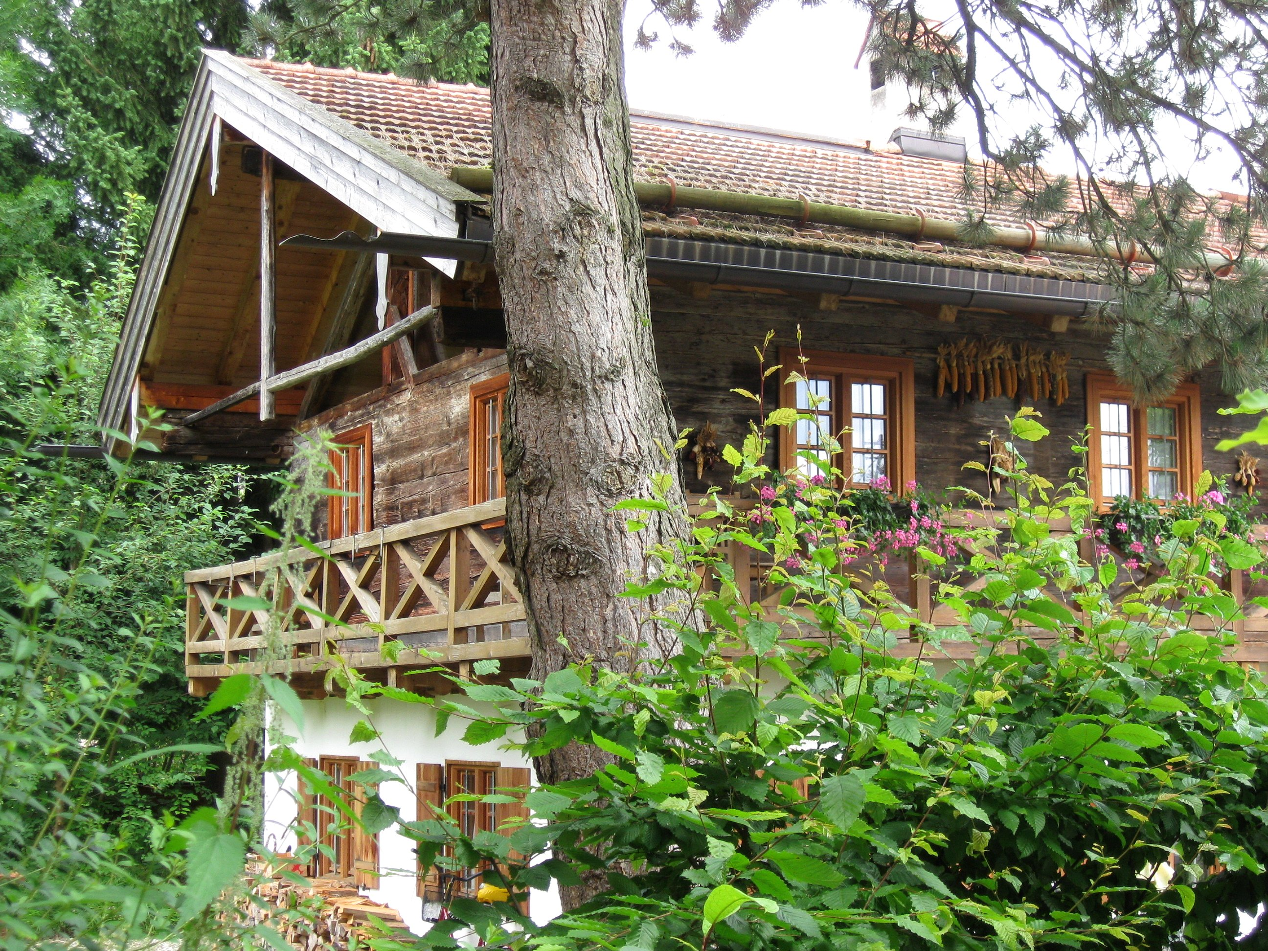 Oberhaching: Bachweg 3; Wohnhaus, wohl ehem. Bauernhaus, mit Blockbau-Obergeschoss, z. T. verbrettert, wohl 18. Jh.